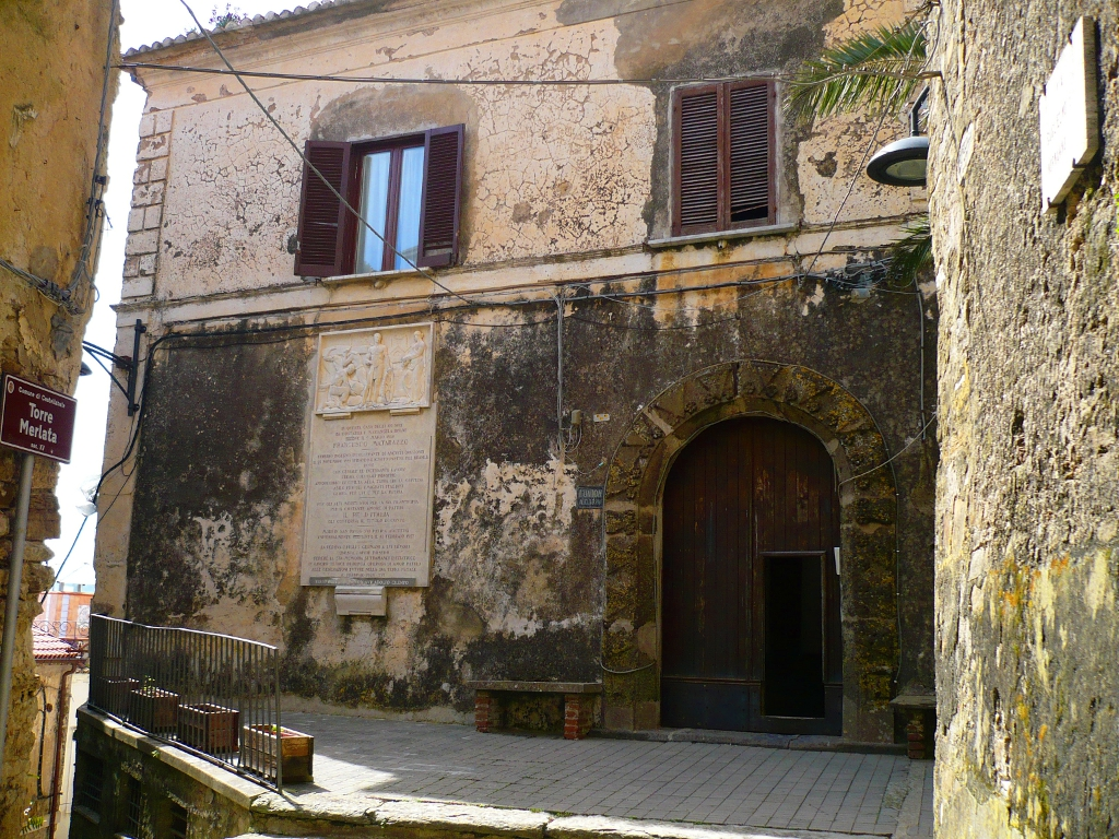 Palazzo Matarazzo, la casa nel borgo medievale di Castellabate dove nacque il conte Francesco Matarazzo prima di emigrare in Brasile